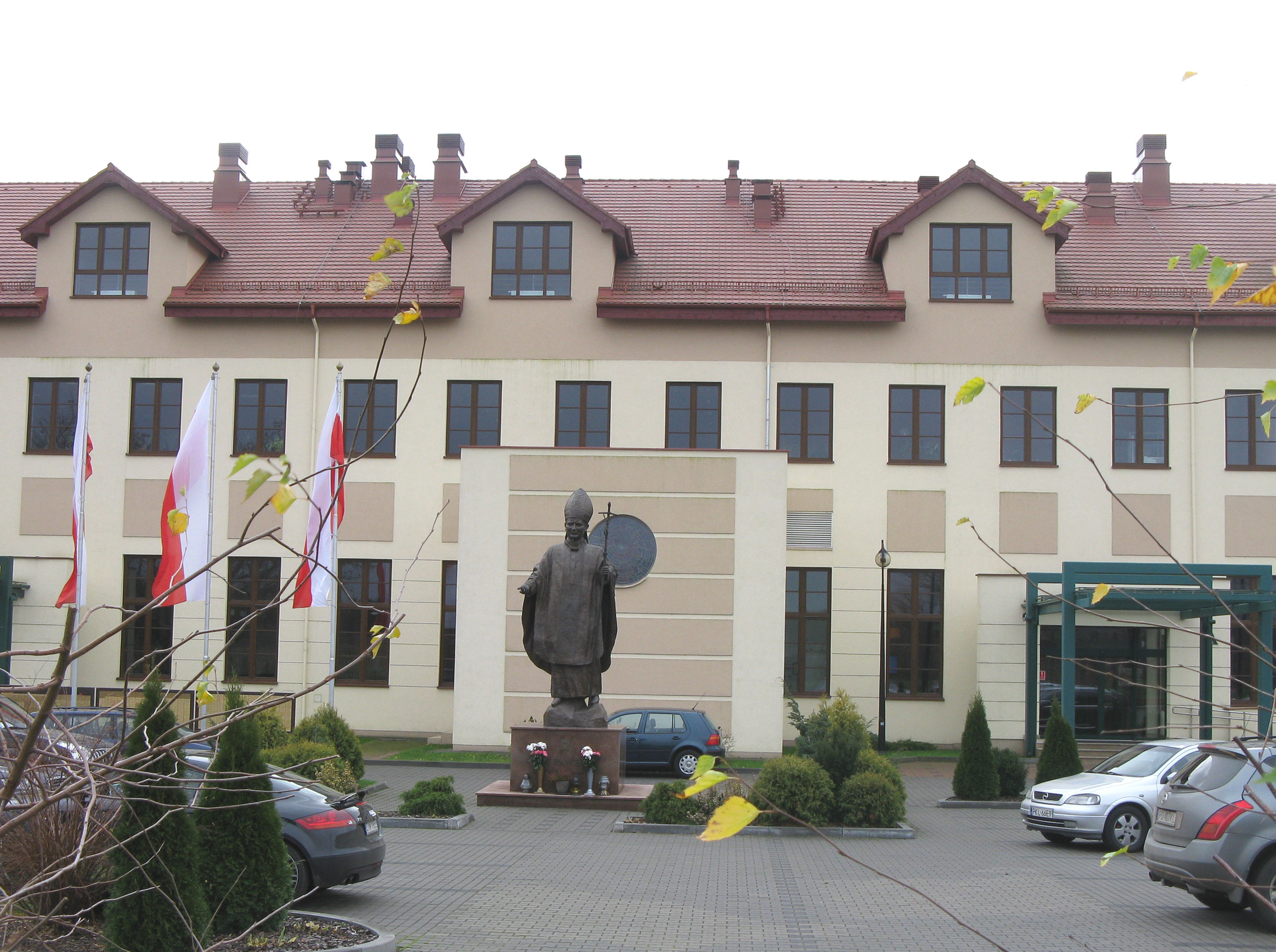 Pomnik Jana Pawła II na terenie Wyższej Szkoły Kultury Społecznej i Medialnej w Toruniu